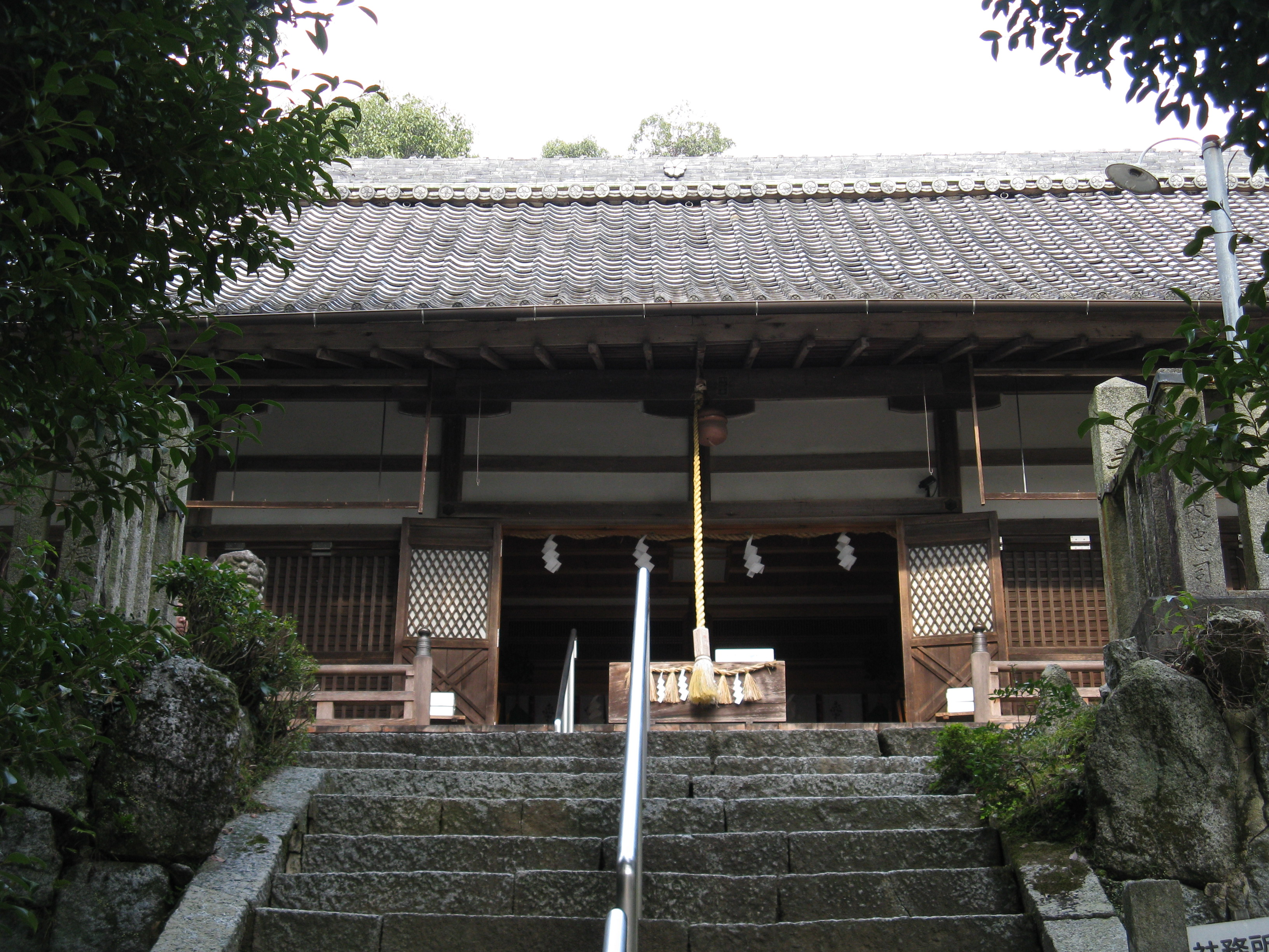 葛木坐火雷神社 拝殿